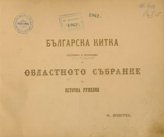 “Българска китка” – сборник, съдържащ партитури на български, руски, чешки и турски народни песни, аранжирани за духов оркестър. Автор: Франц Швестка